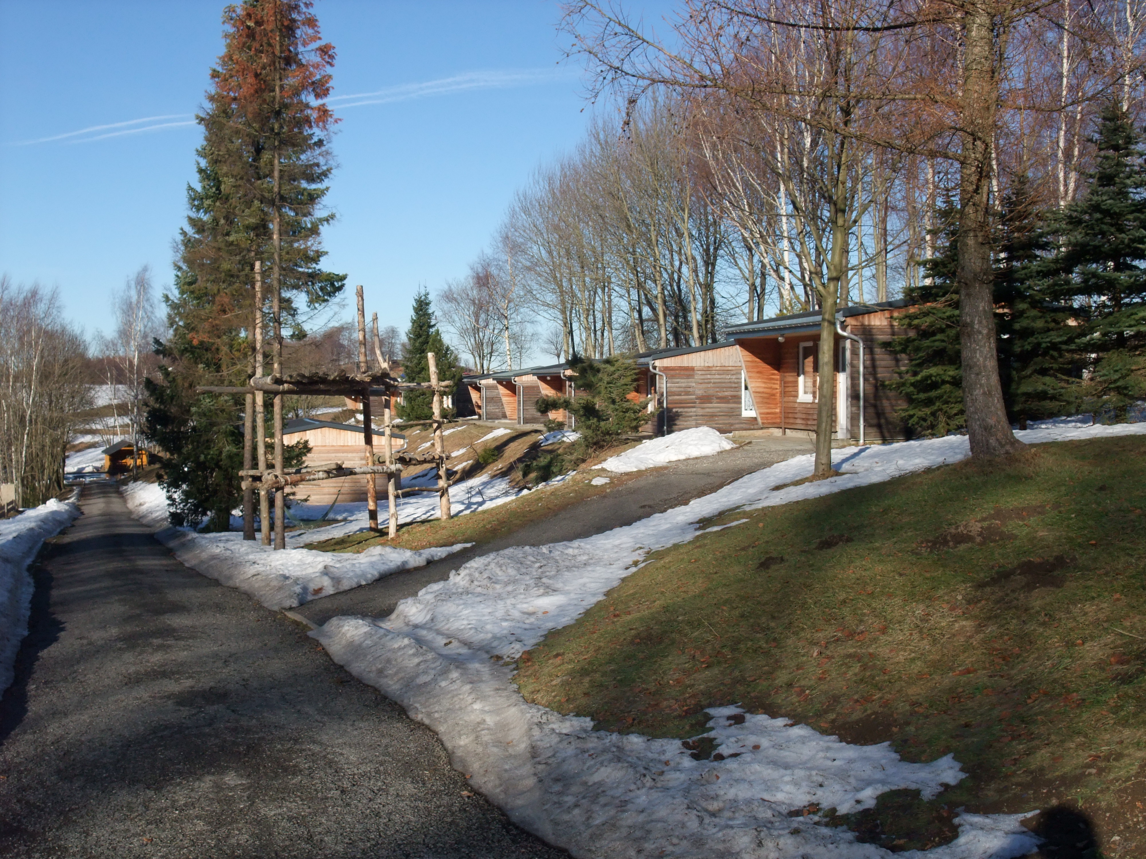 Das Bungalowdorf der Hüttstattmühle nahe Ansprung.